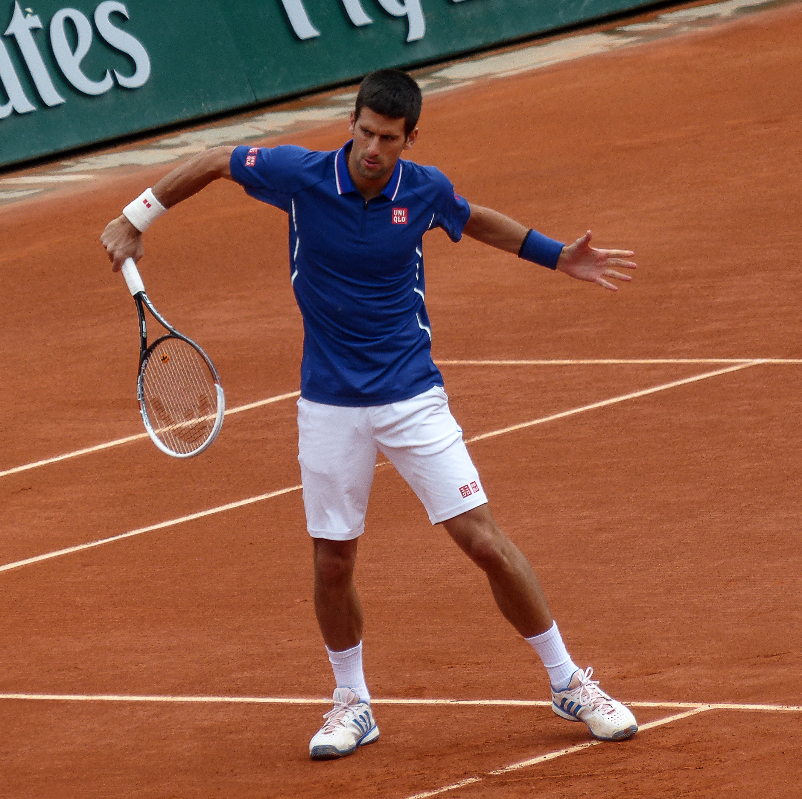 2ème tour Roland Garros 2013 : Novak Djokovic (SRB) def. Guido Pella (ARG)